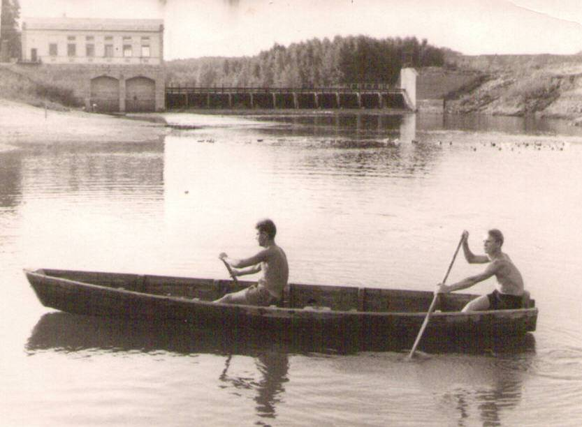 Перегонівська ГЕС